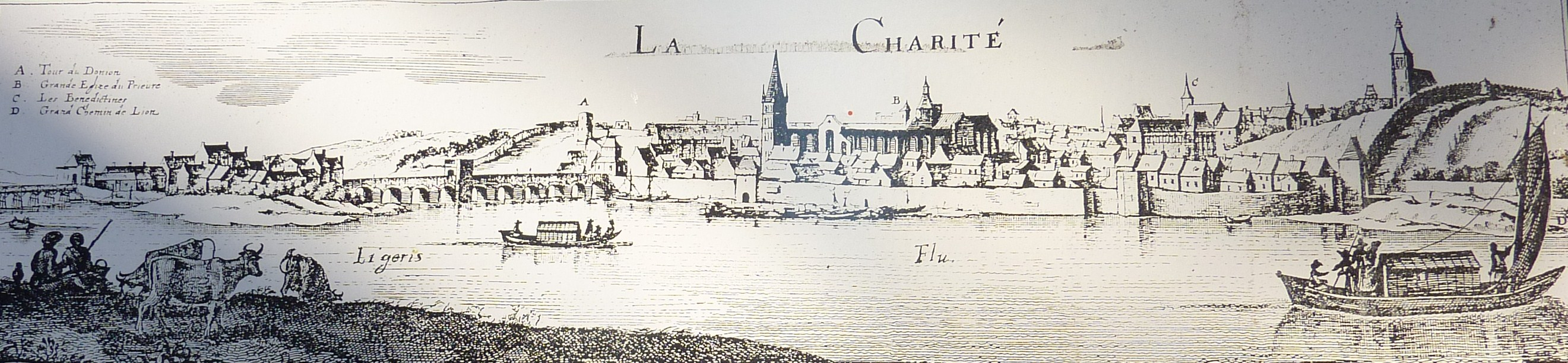 La Charité-sur-Loire au XVIIe siècle (gravure de Merlan)